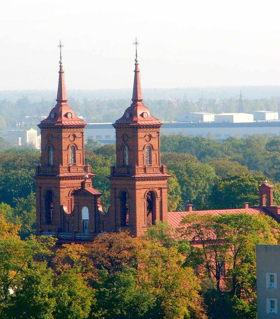 Panevezio Sv. Petro ir Povilo baznycia.